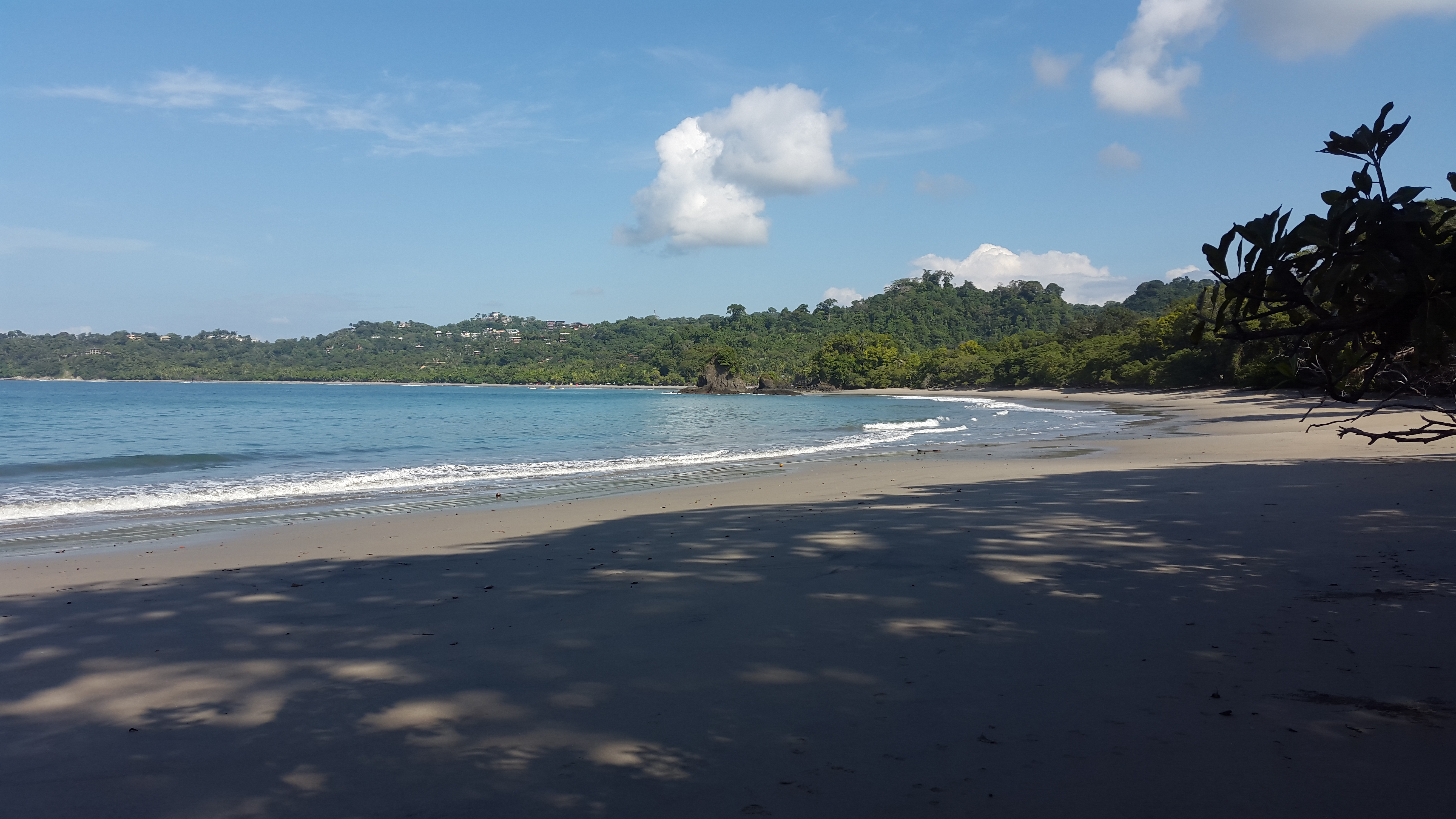 Playa Espadilla Sur, dentro del parque nacional Manuel Antonio.